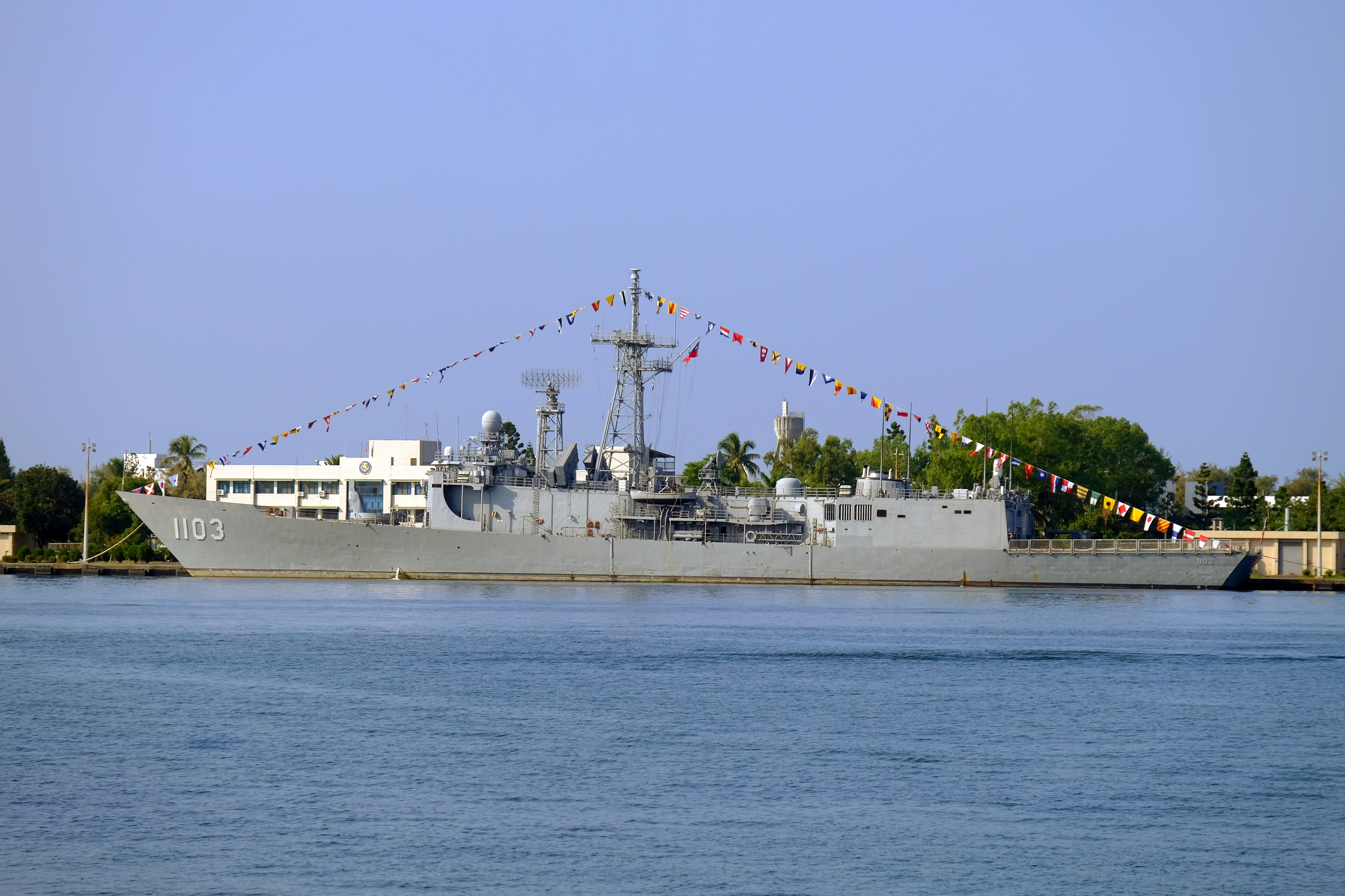 拉起全艦飾、停泊於左營軍港西碼頭的成功級巡防艦鄭和（PFG2-1103），攝於2014年左營軍港營區開放活動。後方白色建物為海軍一二四艦隊部。